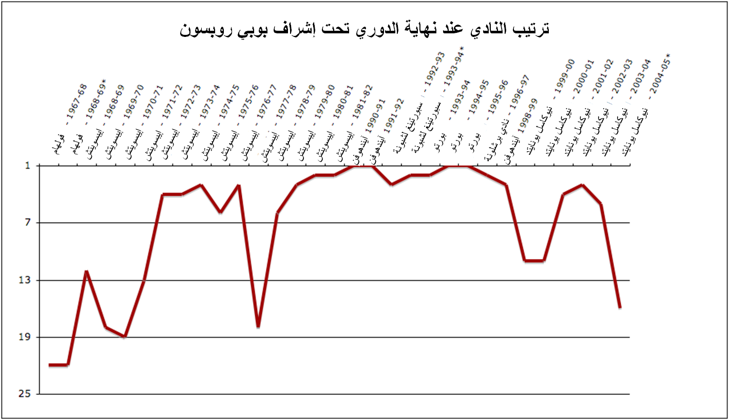 ترتيب النادي عند نهاية الدوري تحت إشراف بوبي روبسون